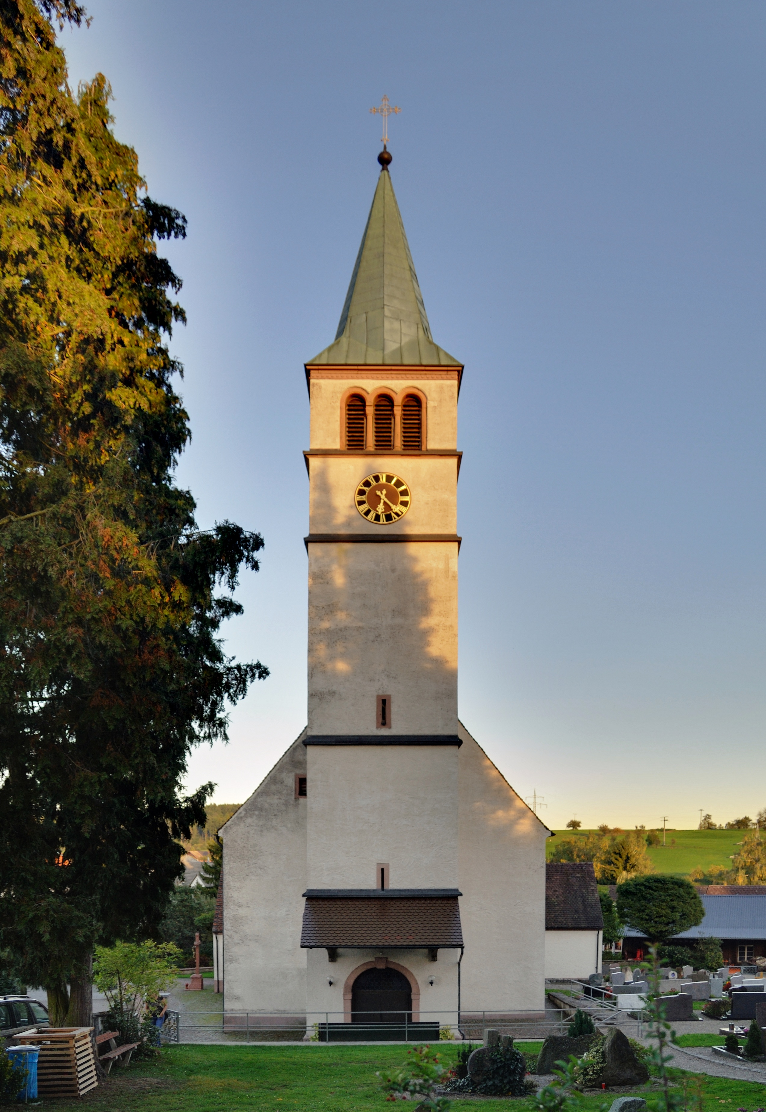 Rheinfelden-Minseln: St. Peter und Paul, Sicht zum Hauptportal